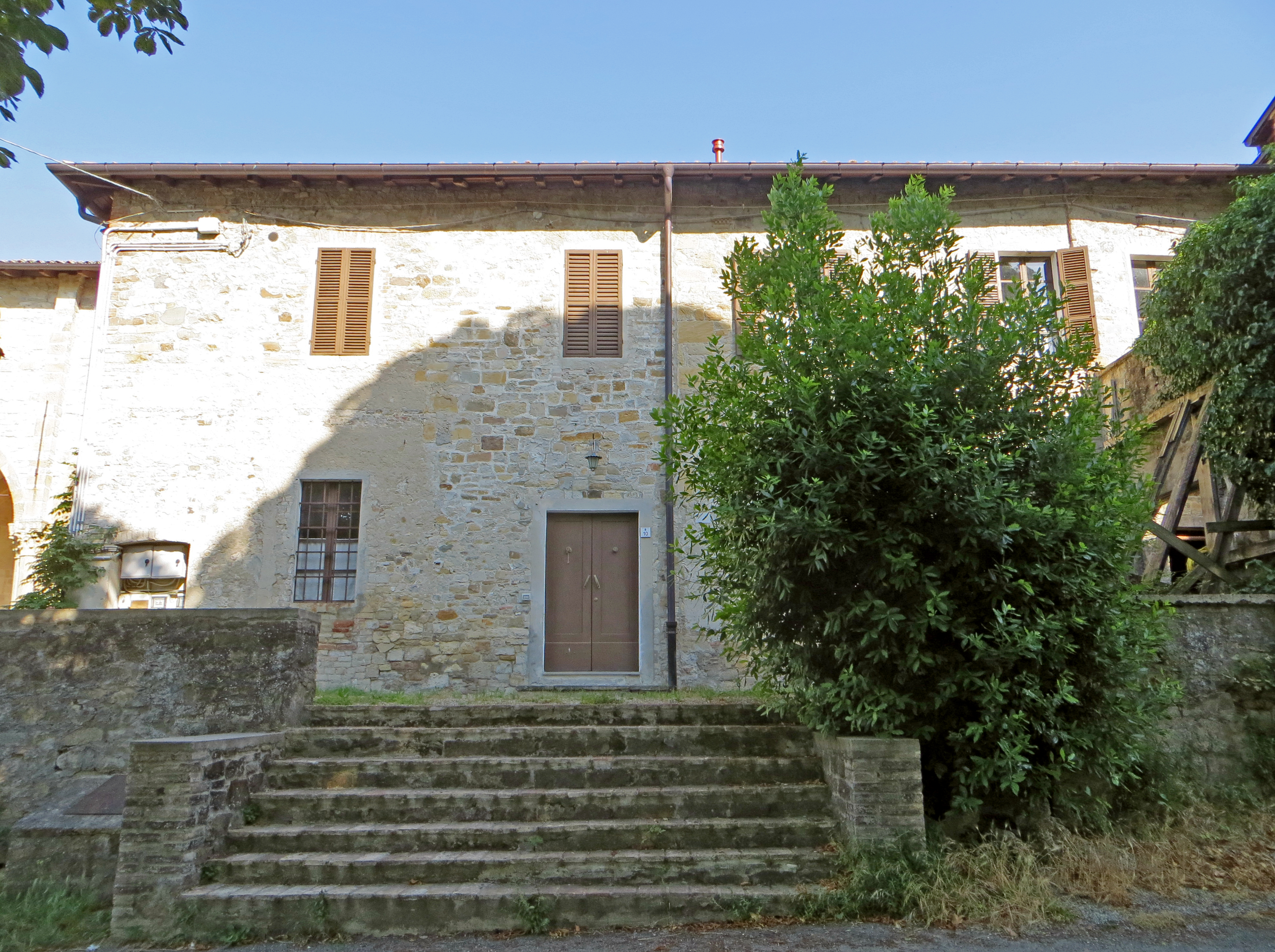 Abbazia di San Basilide (San Michele Cavana, Lesignano de' Bagni) - facciata del monastero This is a photo of a monument which is part of cultural heritage of Italy.